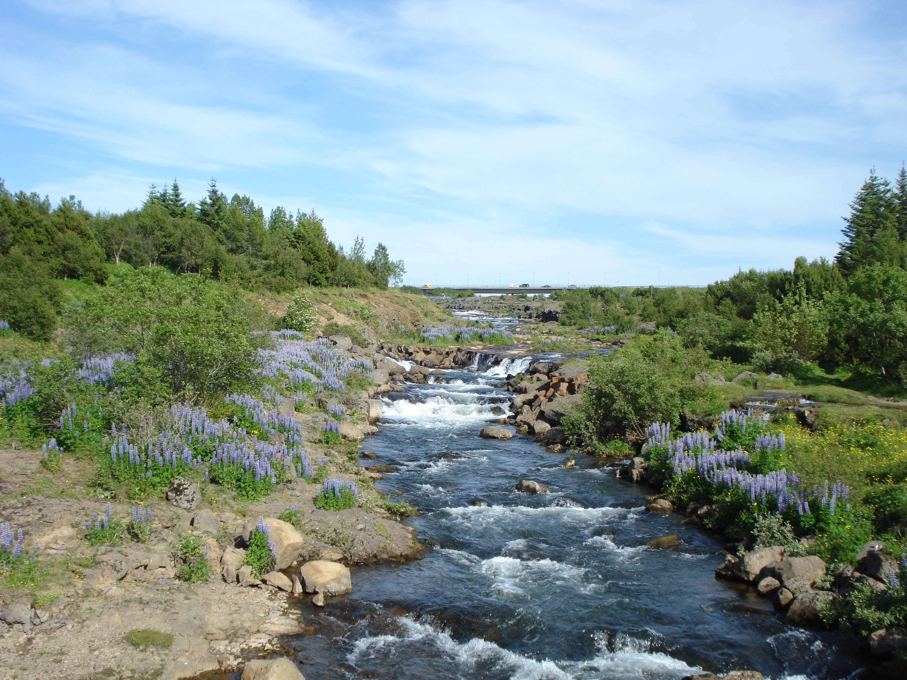 Elliðaár, Reykjavik, Iceland